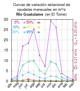 Curvas de variación estacional del río Guatulame en El Tome. # Dirección General de Aguas # Diagnóstico y clasificación de los cursos y cuerpos de agua según objetivos de calidad. Cuenca del río Limarí. # Santiago de Chile # Ministerio de Obras Públicas (Chile) # 2004 # url: # urlarchivo: # Tabla 4.15: Río Guatulame en el Tome, p. 59 mes 5% 10% 20% 50% 85% 95% abr 1.055 0.636 0.346 0.112 0.033 0.019 may 2.484 1.437 0.741 0.209 0.044 0.018 jun 16.941 7.699 2.962 0.477 0.050 0.013 jul 18.568 9.586 4.304 0.932 0.141 0.047 ago 25.272 9.939 3.214 0.378 0.035 0.014 sep 12.576 5.248 1.825 0.249 0.029 0.014 oct 7.228 3.399 1.363 0.238 0.028 0.008 nov 29.331 9.574 2.472 0.193 0.017 0.010 dic 26.149 8.431 2.145 0.164 0.015 0.010 ene 3.704 1.750 0.709 0.132 0.023 0.013 feb 1.915 0.874 0.342 0.062 0.015 0.011 mar 0.770 0.449 0.236 0.073 0.022 0.014 This plot was created with Gnuplot.